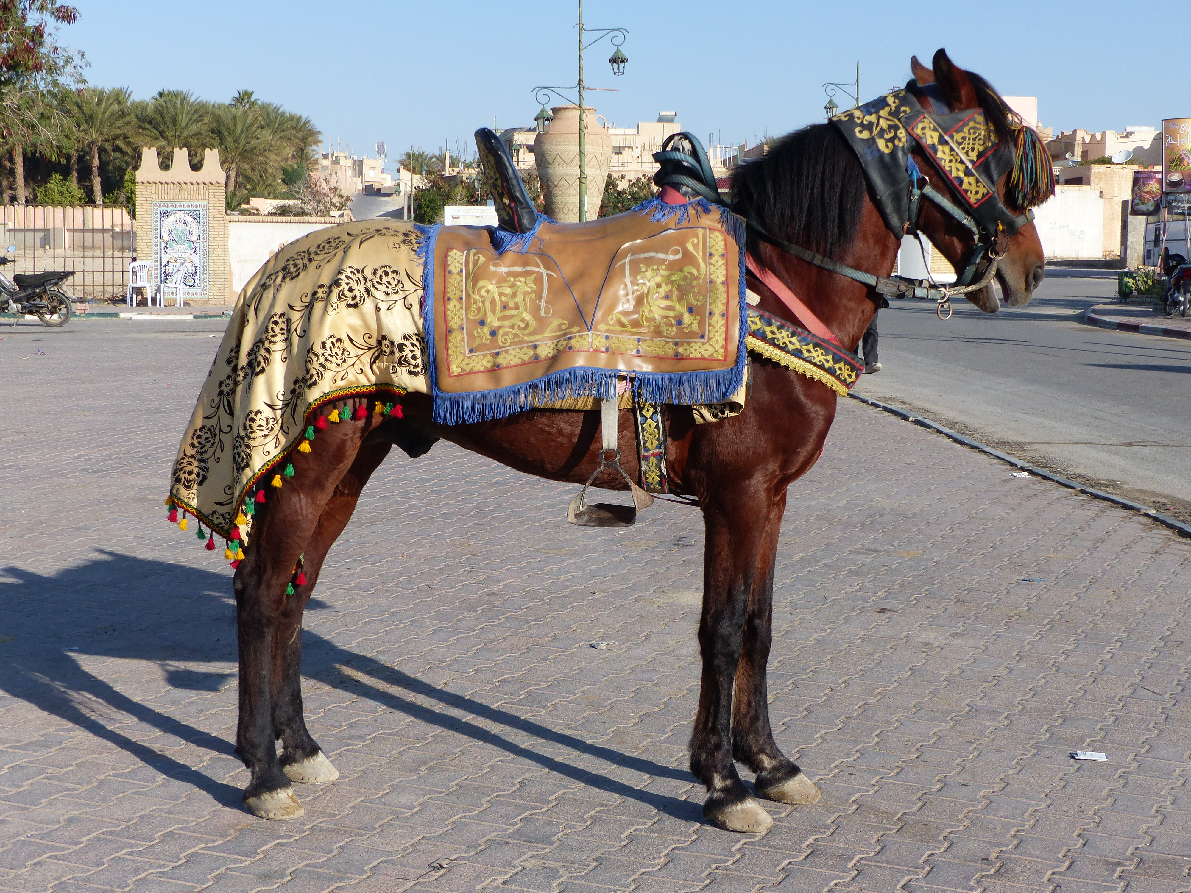 Cheval Barbe bai paré pour une fantasia, à Tozeur